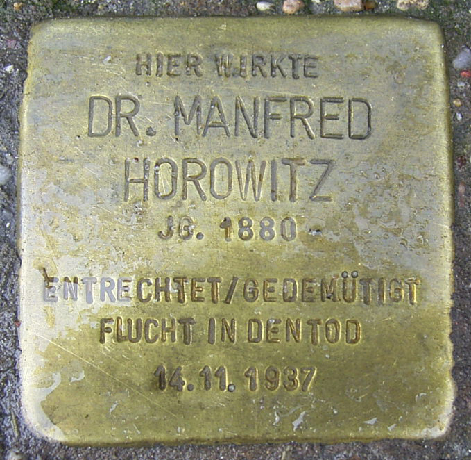 Stolperstein für den SPD-Politiker und Rechtsanwalt Manfred Horowitz (1880-1937) in der Kaiser-Wilhelm-Straße 23 in der Hamburger Neustadt.